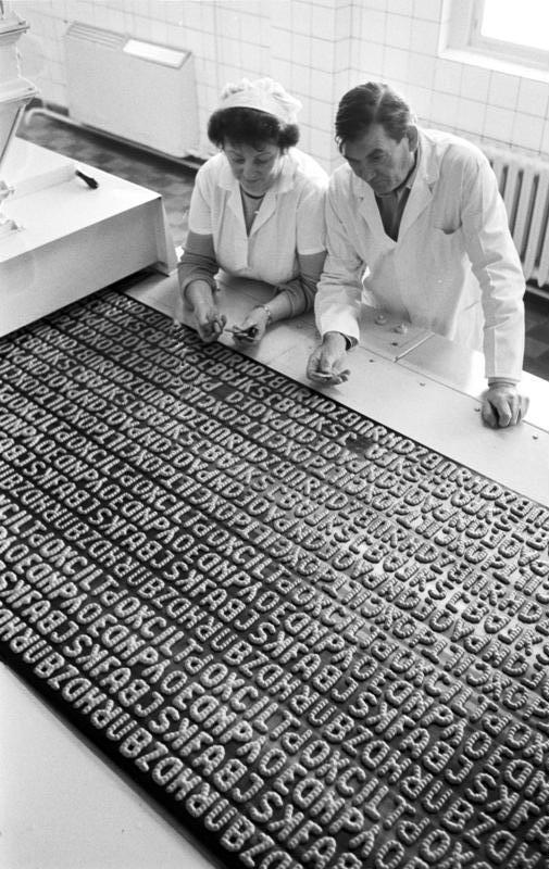 Dresden, Russisch-Brot- Herstellung ADN-ZB/Häßler 22.1.90 Dresden: Russisch-Brot Zwar etwas kompliziert zu lesen, dafür umso schmackhafter ist der Text auf dem endlosen Stahl-Backblech der Russisch-Brot-Linie im VEB Dauerbackwaren Dresden. Im Dezember 1989 wurde hier eine Versuchsanlage in Betrieb genommen, die es ermöglicht, jetzt 600 statt bisher 260 Tonnen der Knabberei pro Jahr zu liefern. In 6,5 Minuten durchläuft das süße Kauderwelsch den Backprozeß. Produktionsstättenleiter Manfred Keese und TKO-Leiterin Renate Keese testen die Backqualität. Trotz der Produktionsteigerung in Dresden wird man Russisch-Brot künftig noch oft vergeblich in den Kaufhallenregalen suchen. Der Dresdner Betrieb "profilierte" sich gezwungenermaßen zum Alleinhersteller in der DDR, da andere Produzenten im Lande aufgaben. Laut Marktforschung könnten pro Jahr 1.200 Tonnen Russisch-Brot in der DDR verkauft werden.